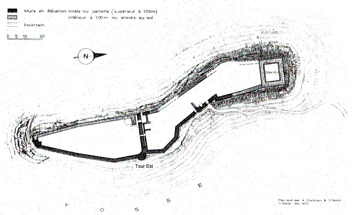 plan du château de Rochefort réalisé par André châtelain et Jacques Tealdi